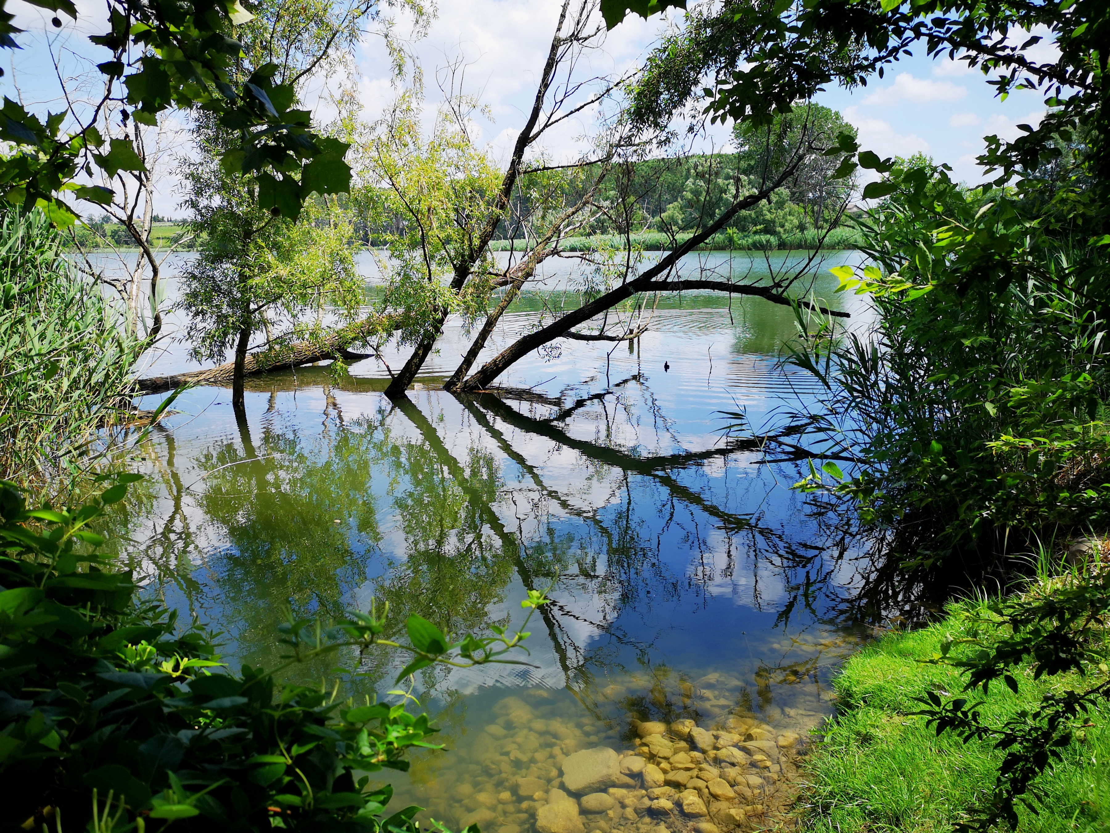 Laghetto del Frassino (Q55719781)